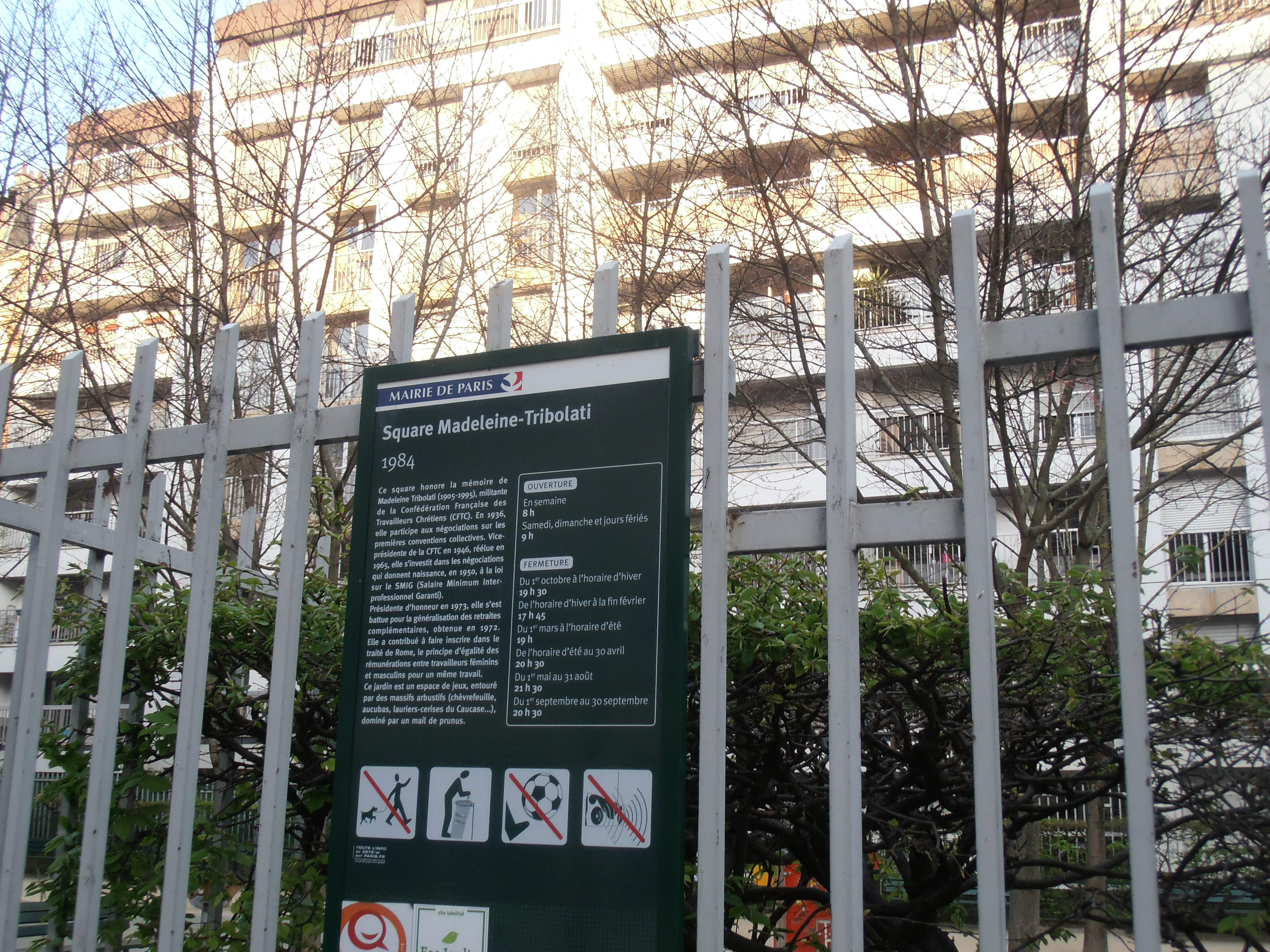 Paris, quartier du canal St Martin